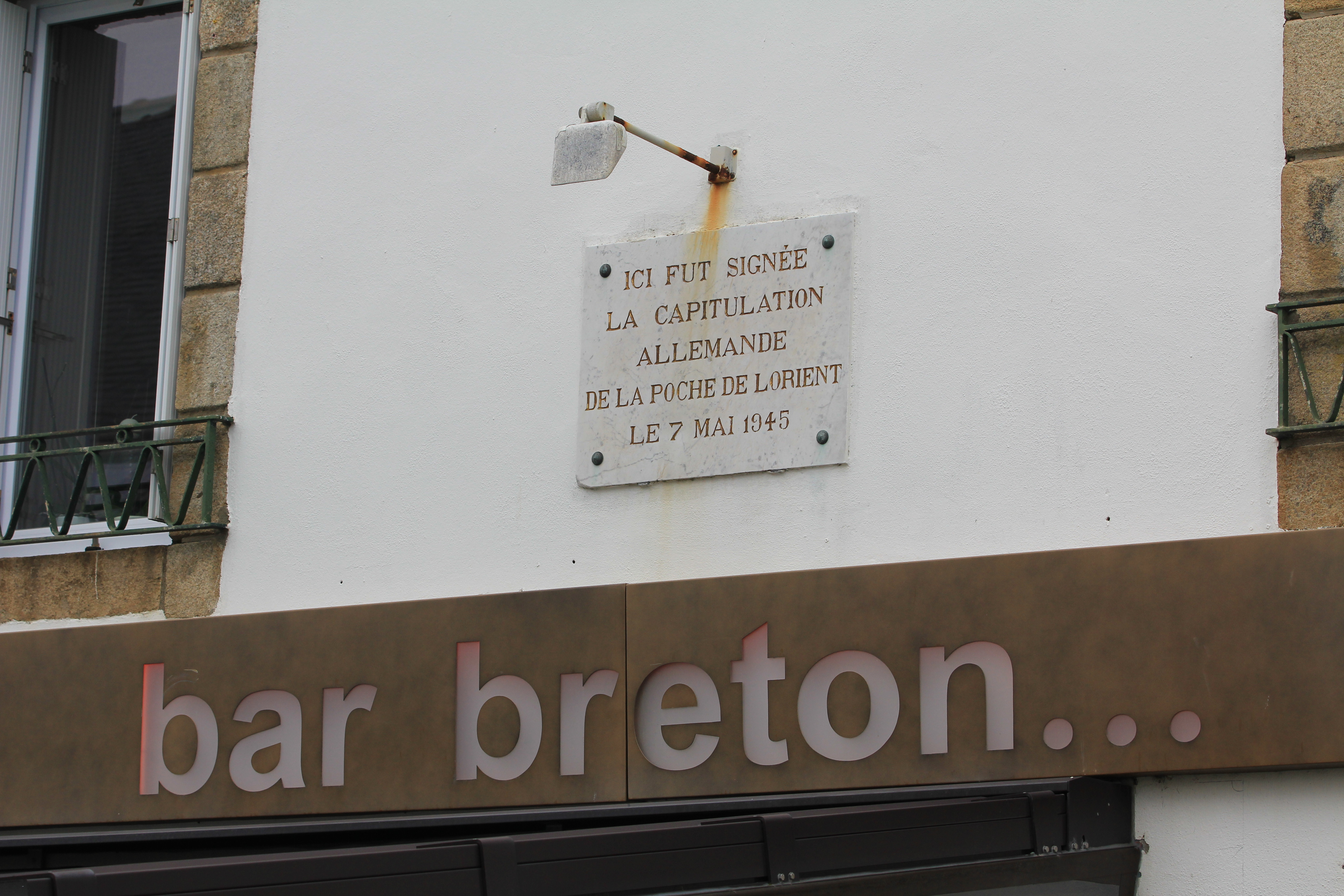 plaque de la reddition allemande d'Etel, France